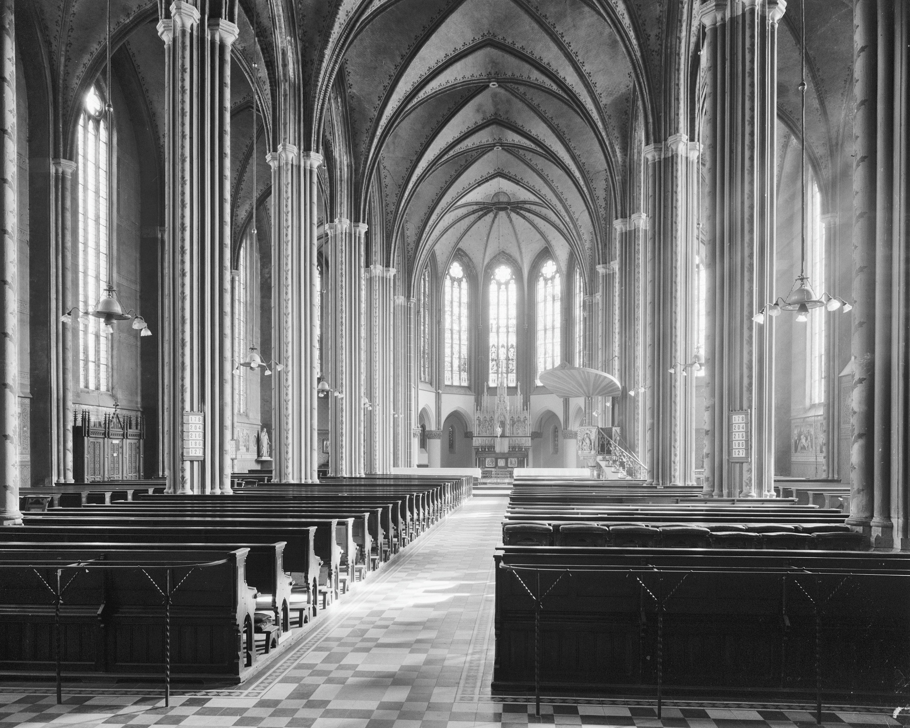 voormalige Sint Michaels Kerk Rooms-Katholieke Kerk: interieur naar het oosten